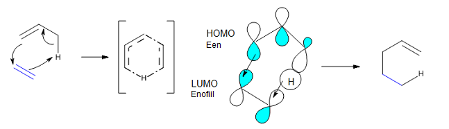 Een-reaktsioon. Kooskõlaline mehhanism